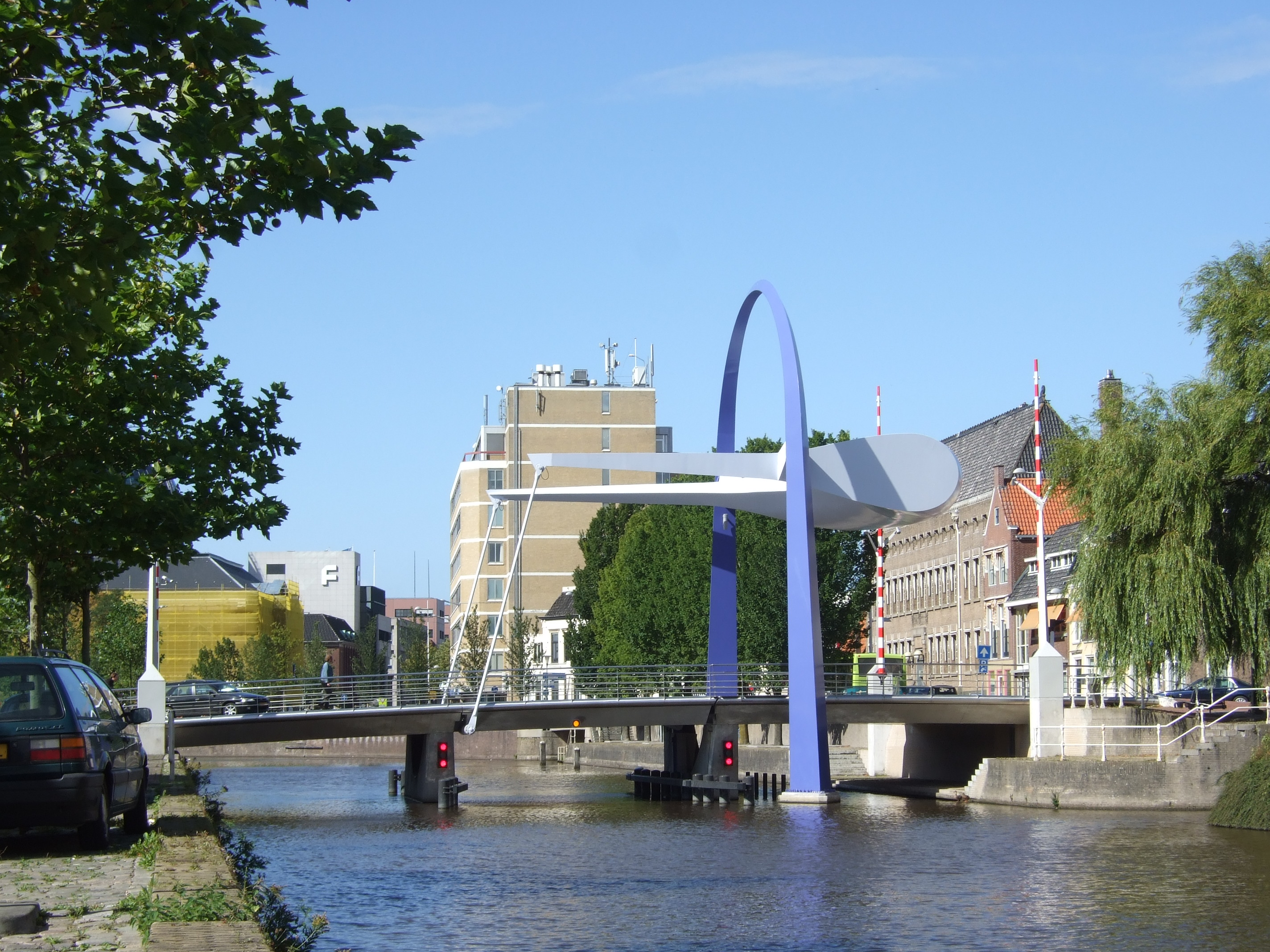 PoortBrug te Leeuwarden. Ophaalbrug met moderne vormgeving. Over de voormalige stadsgracht naast de Blohuispoortgevangenis.